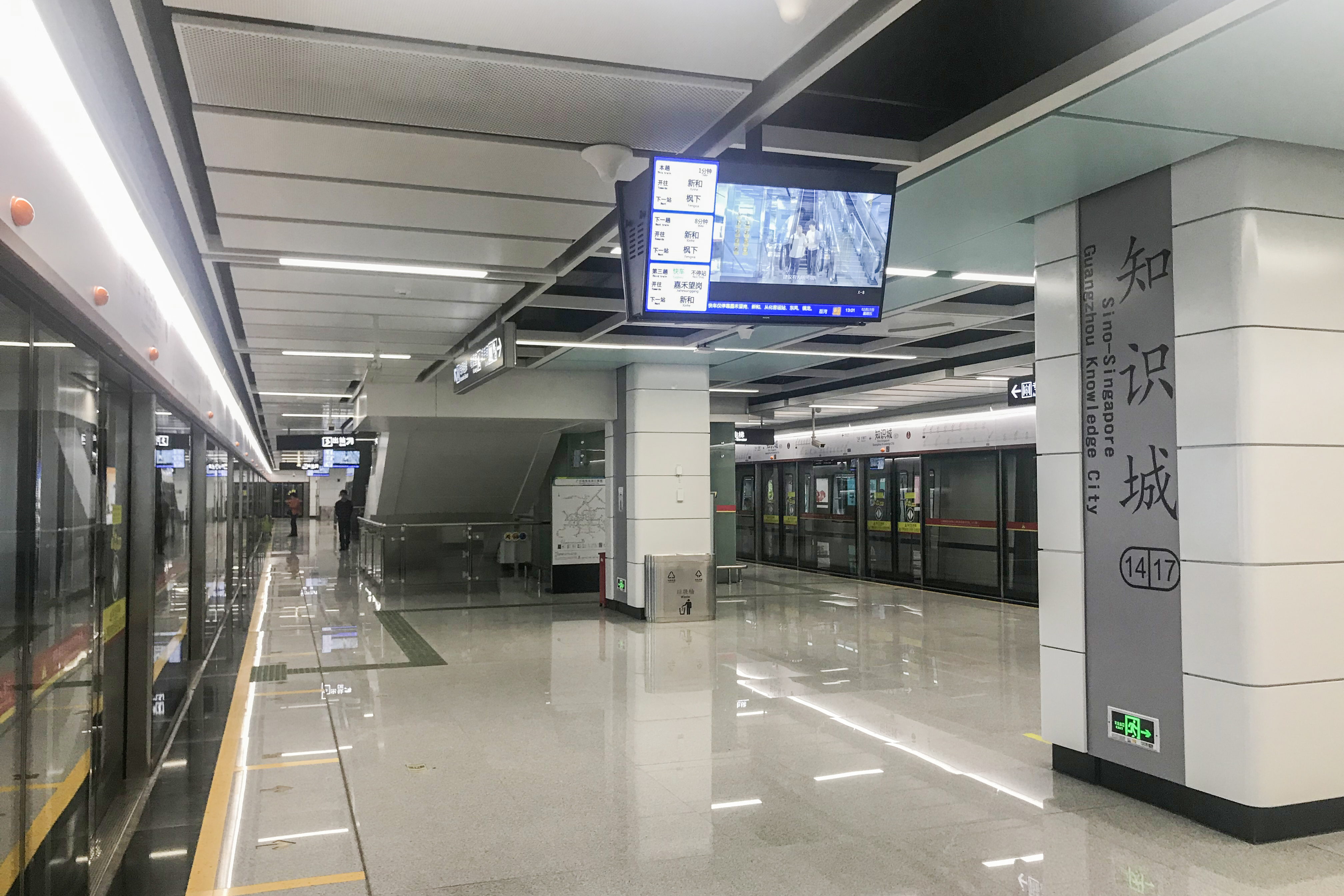 广州地铁知识城站